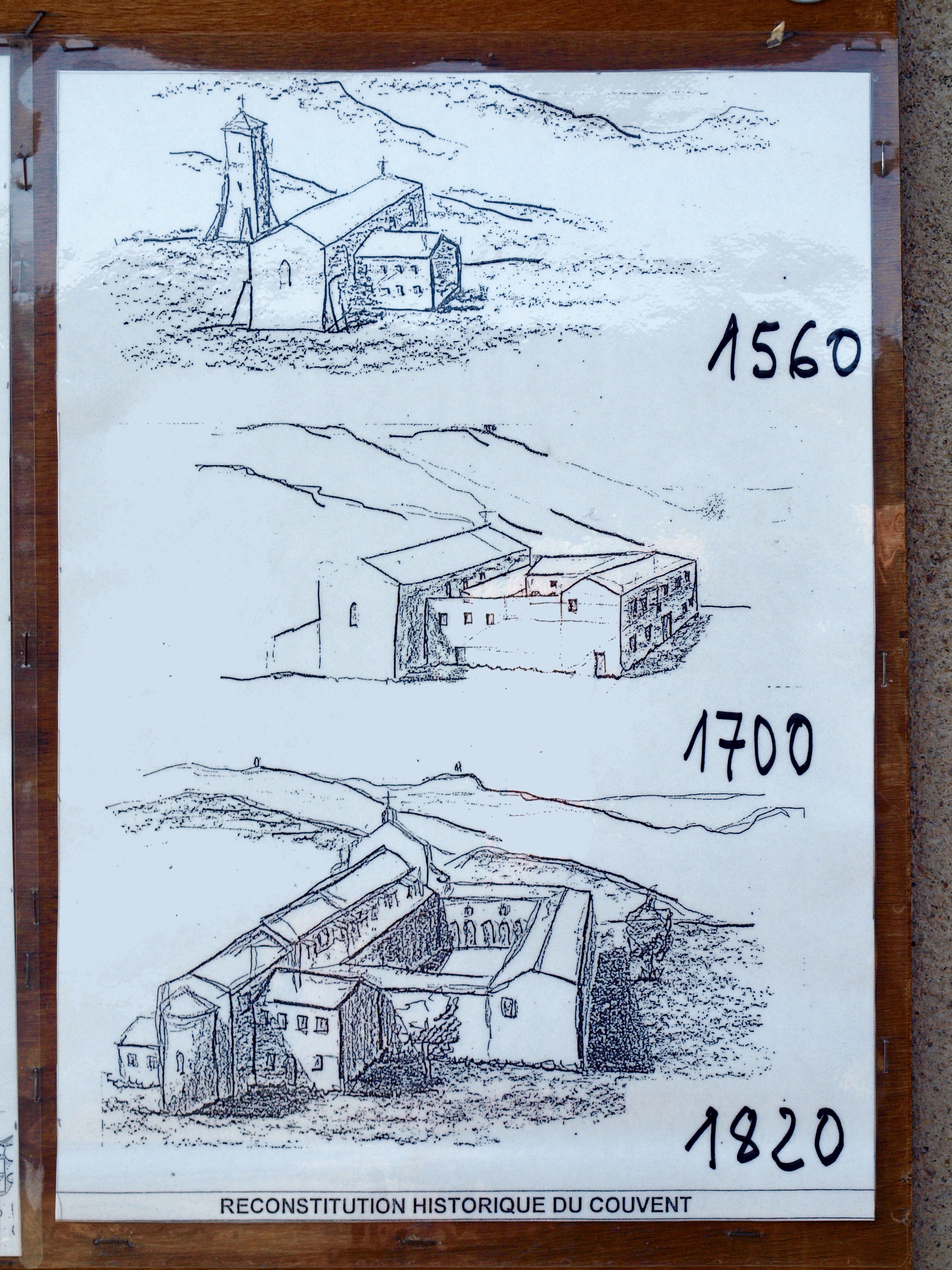 Morsiglia (Corsica) - Reconstitution historique du couvent de l'Annonciation